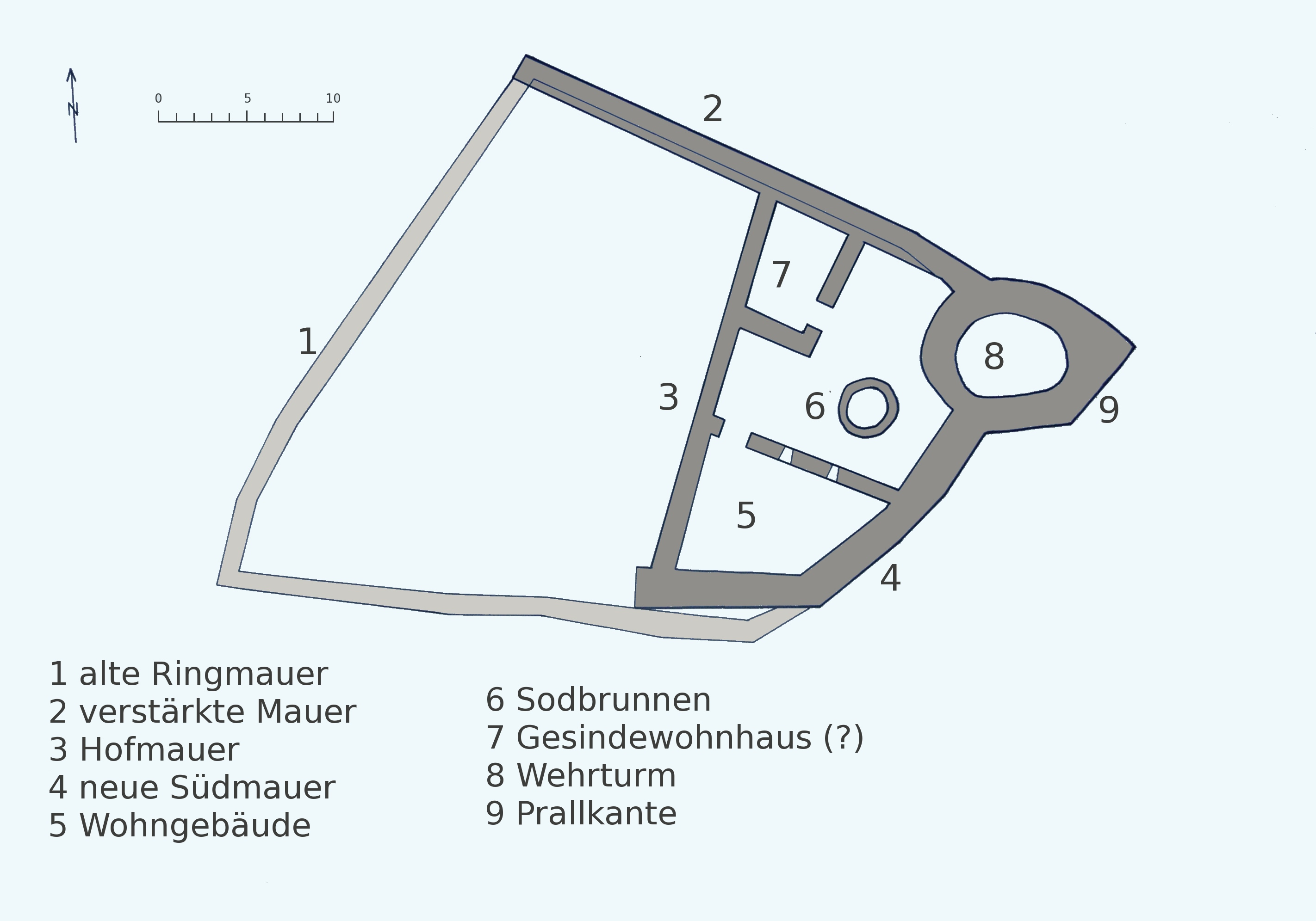 Ruine Wulp Wulp um 1250